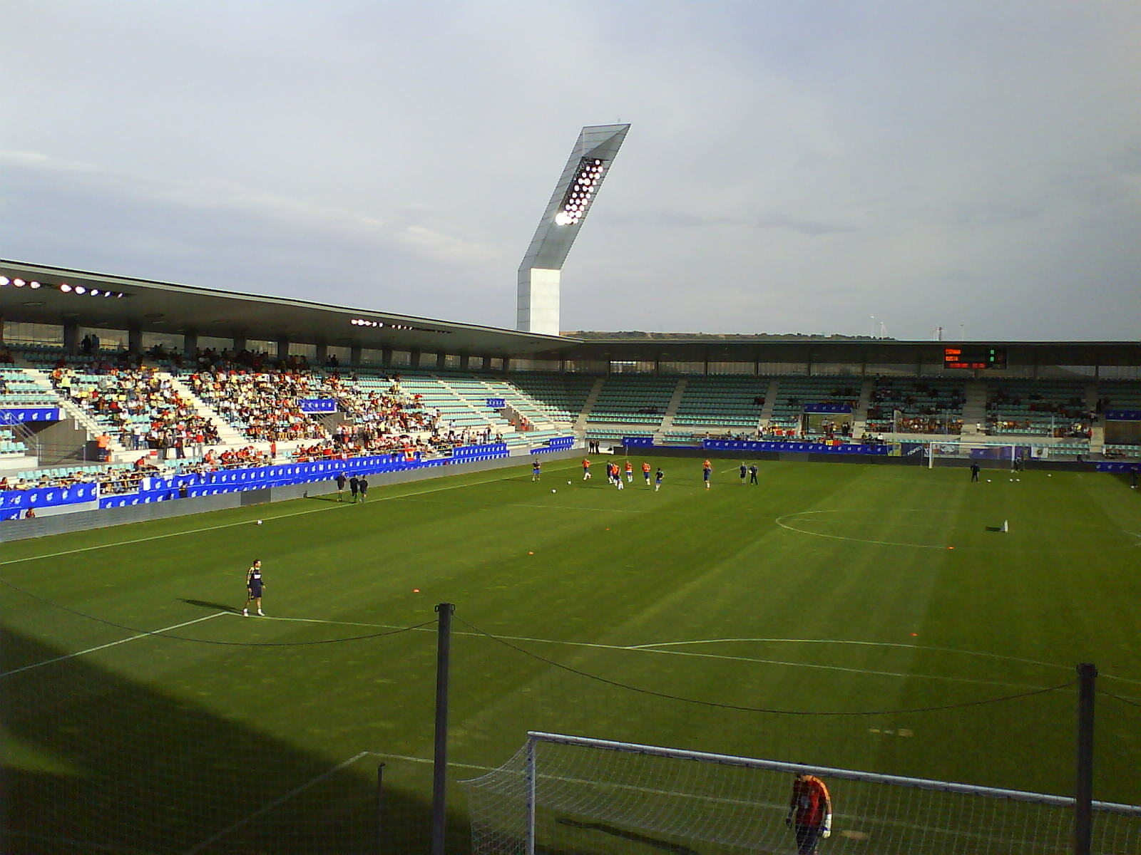 Estadio Nueva Balastera de Palencia (interior).